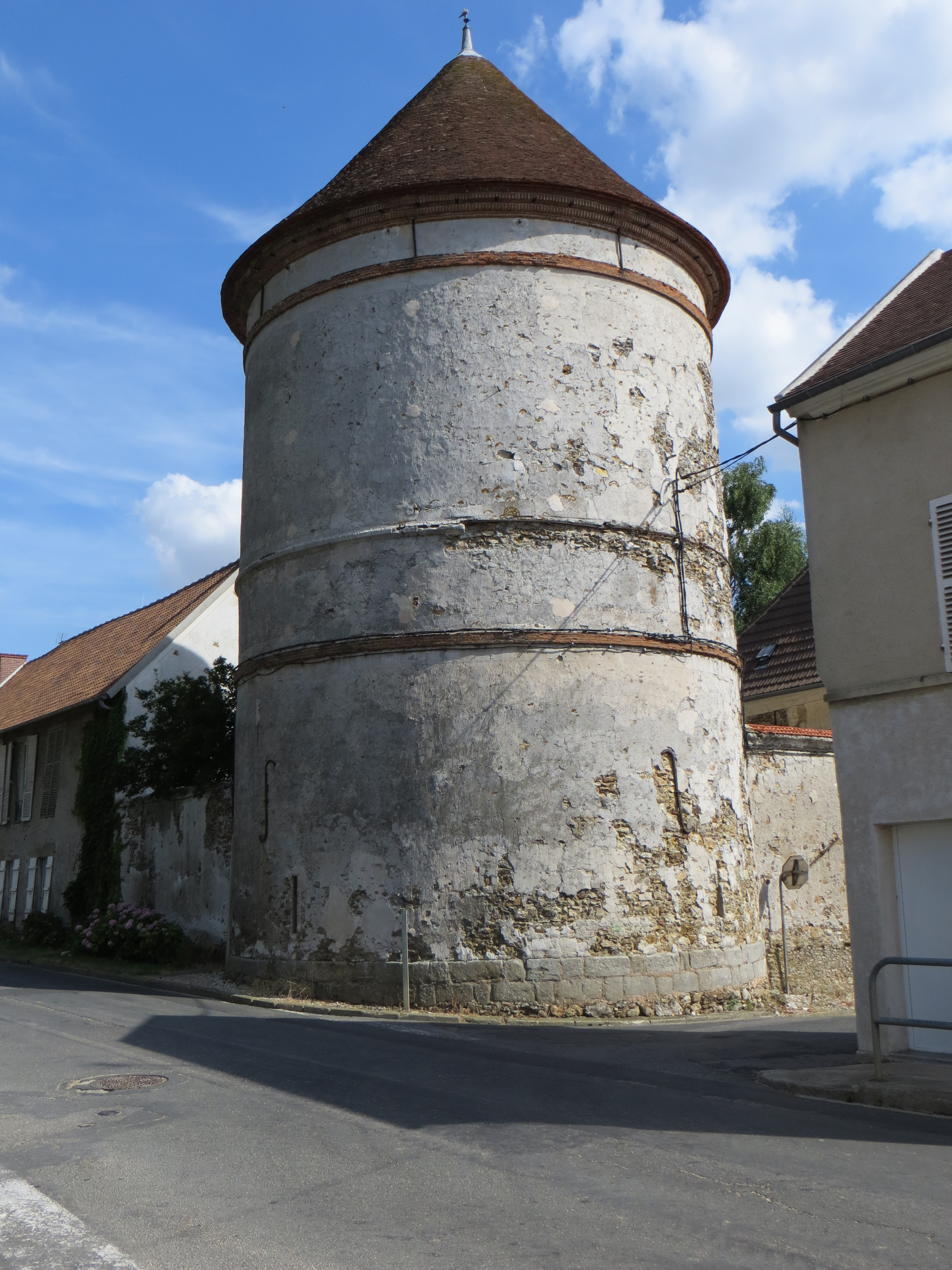 Pigeonnier de Coulommes (XIIe-XIIIe siècle?), rehaussé en 1730